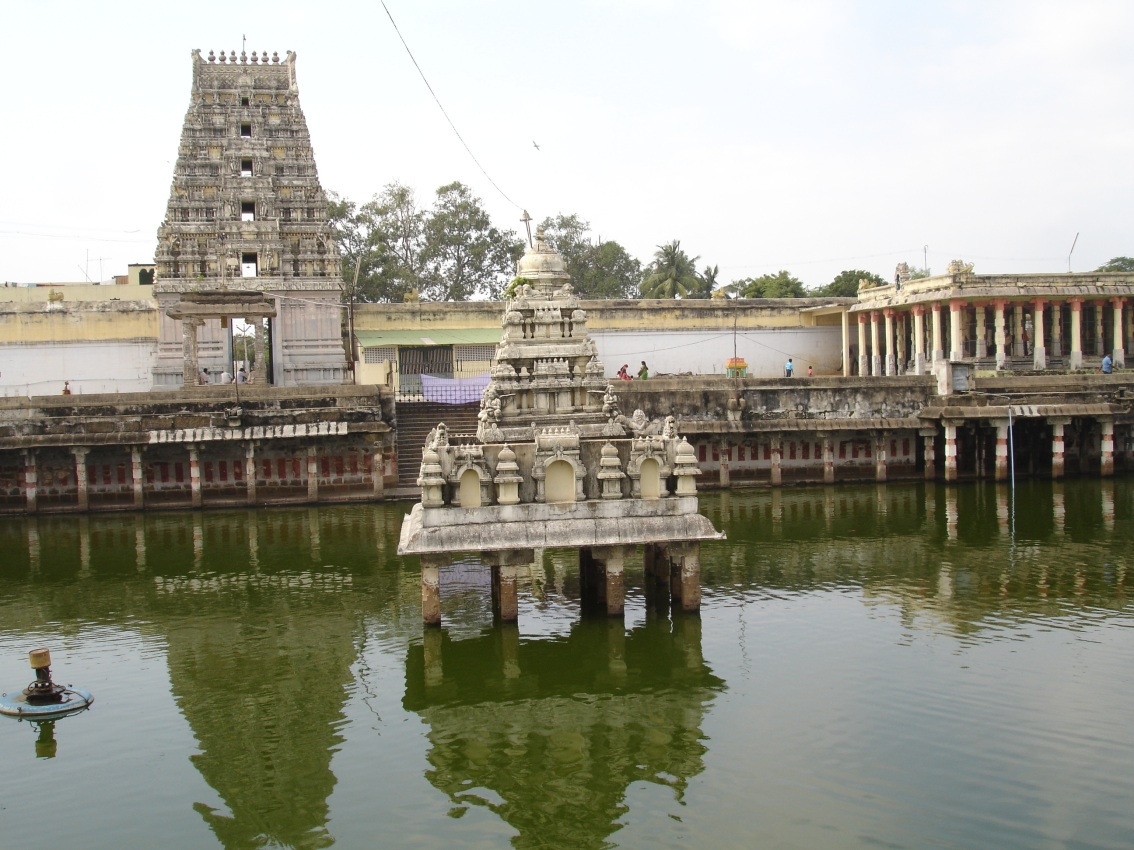 Kanchipuram.in Kamakshi-Amman Temple